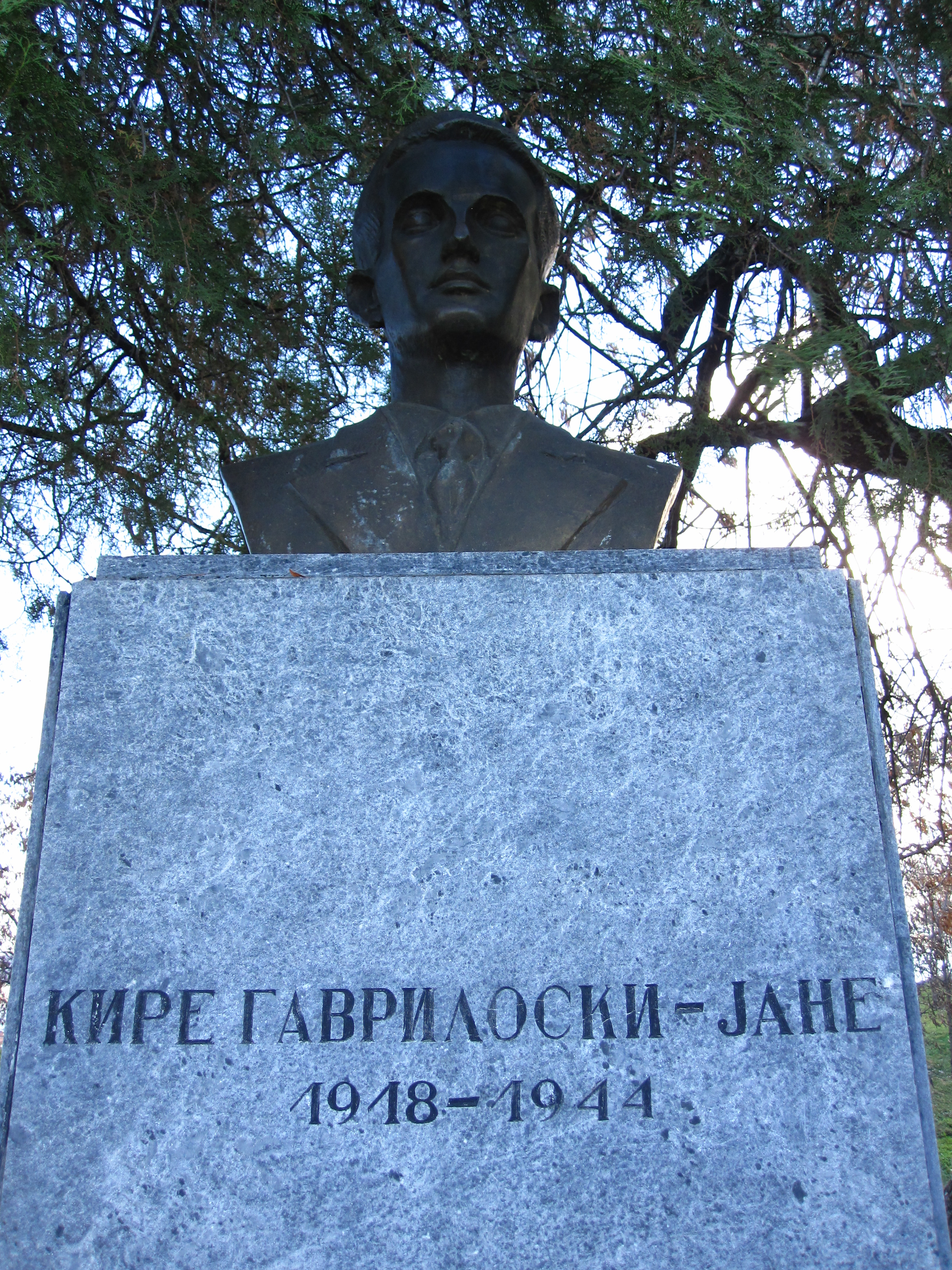 Биста - Кире Гаврилоски - Јане - Прилеп